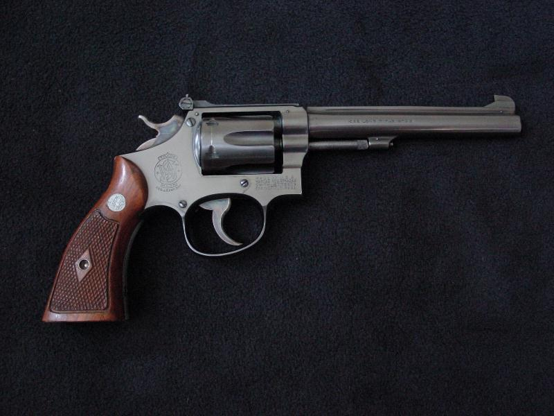 S_W K22 7